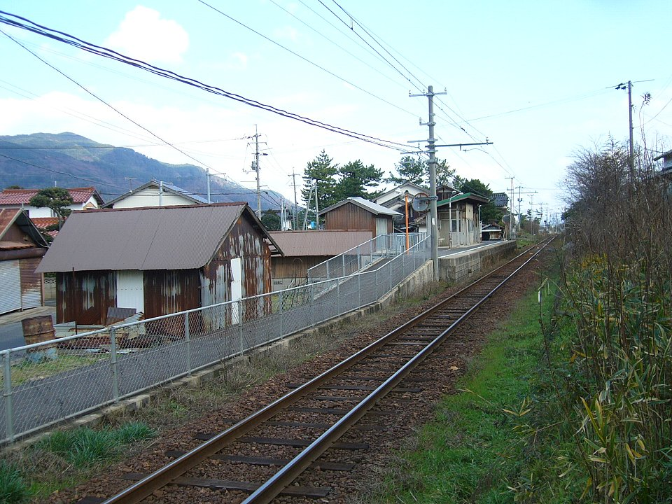 一畑電車 浜山公園北口駅 東望